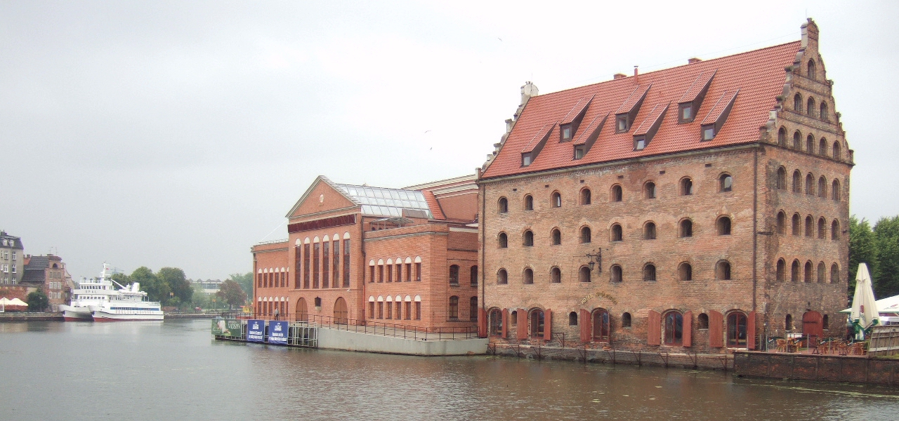 Motława w Gdańsku, Hotel Królewski i Filharmonia Bałtycka na Ołowiance.